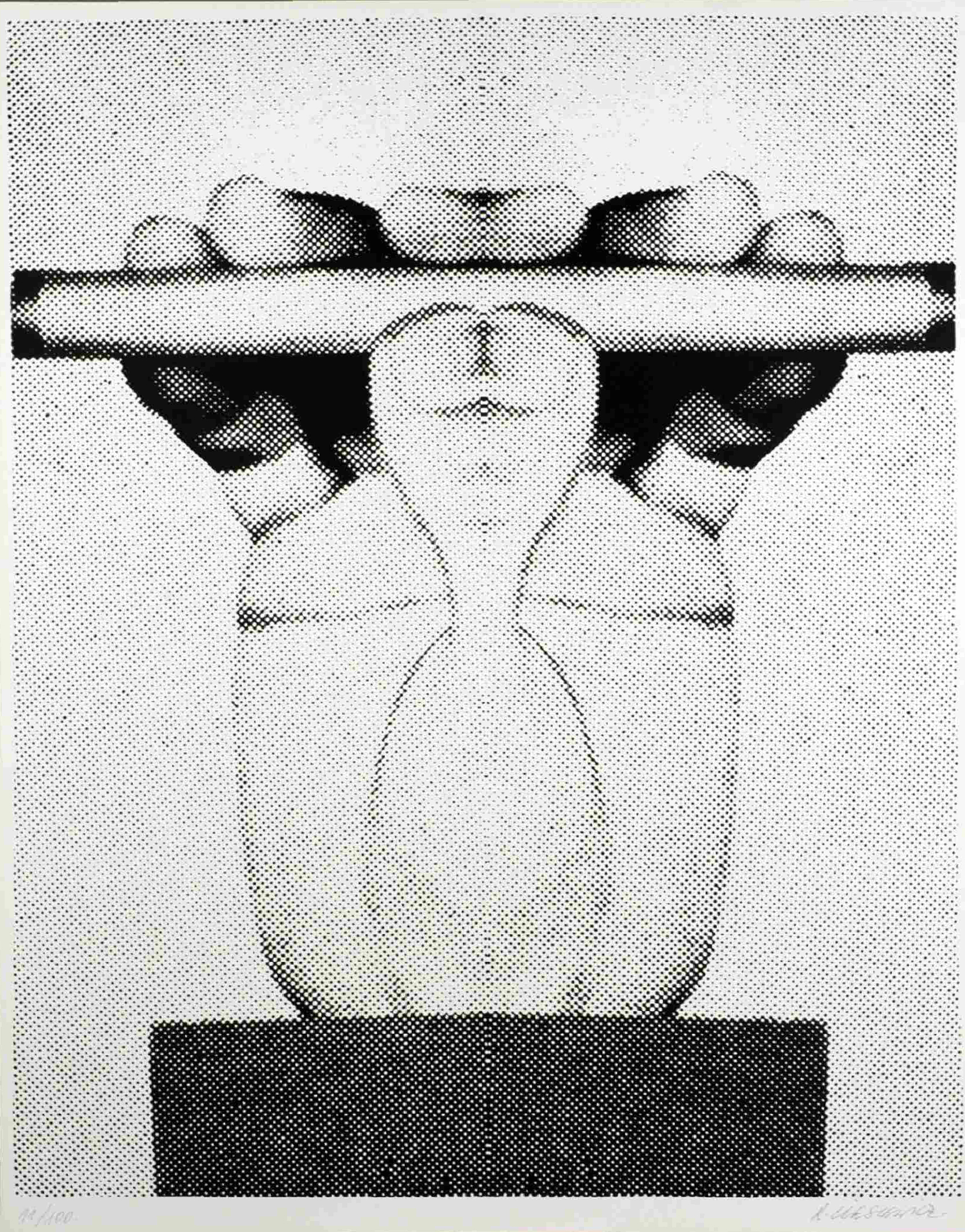 Sérigraphie sans titre. Collectie Gederland